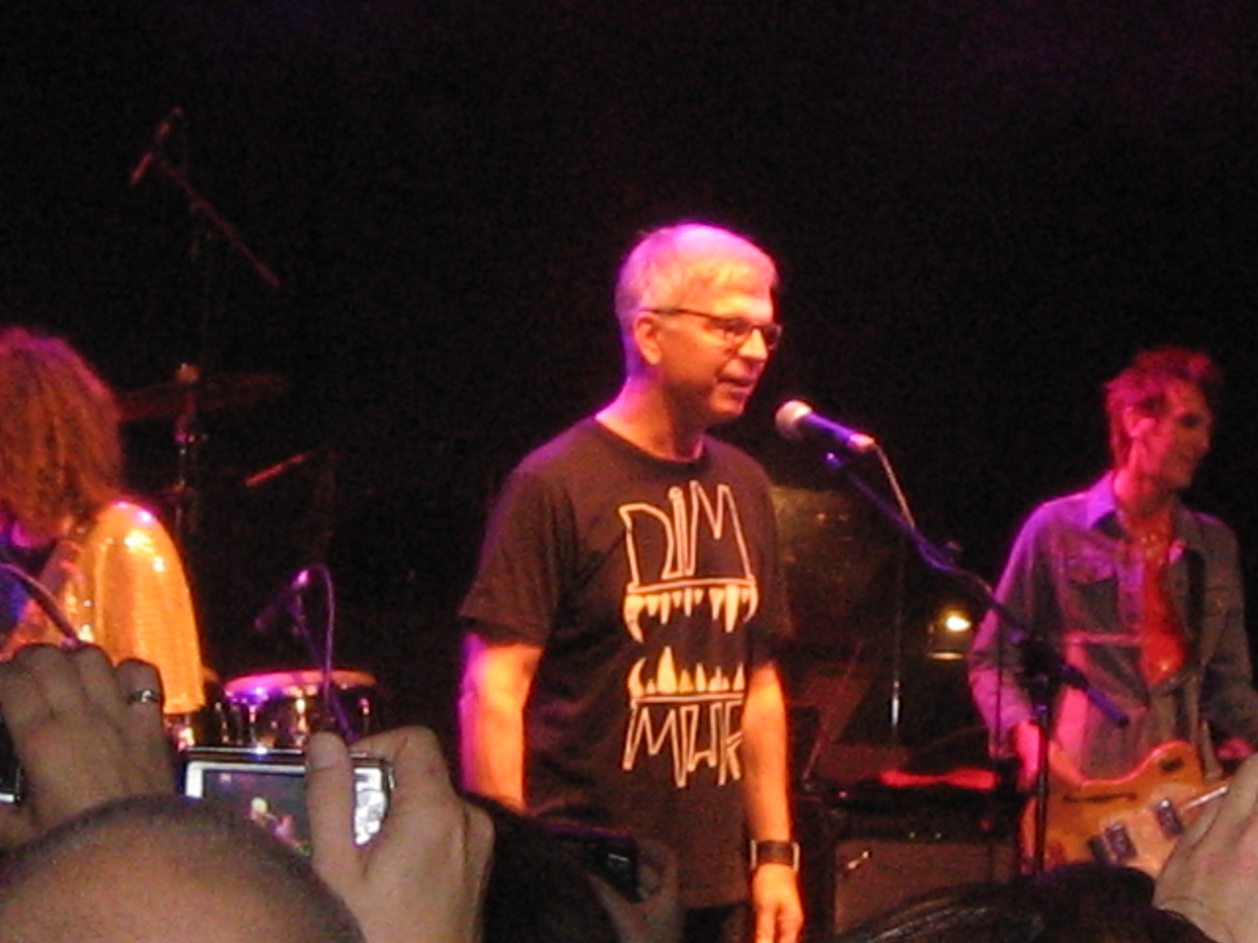 Tony Visconti sur scène en 2007